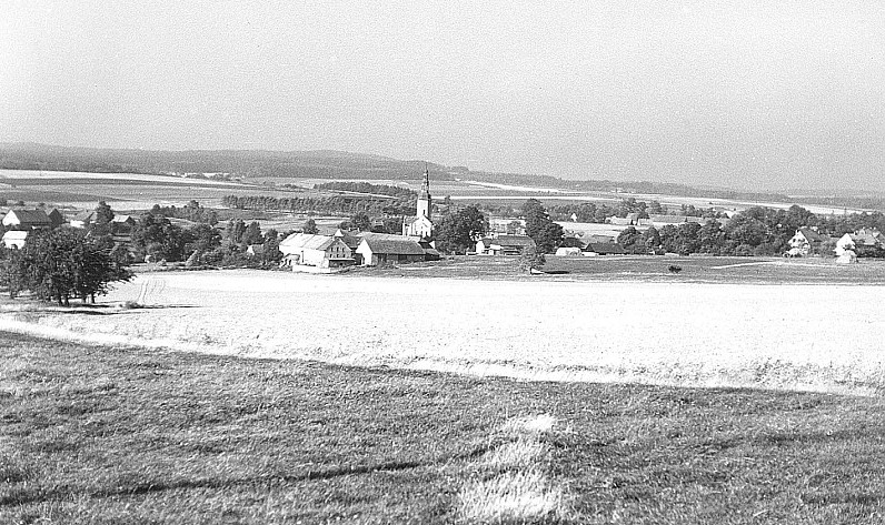 Original image description from the Deutsche Fotothek Bernstadt auf dem Eigen-Kemnitz. Blick vom Windmühlenberg auf Kemnitz